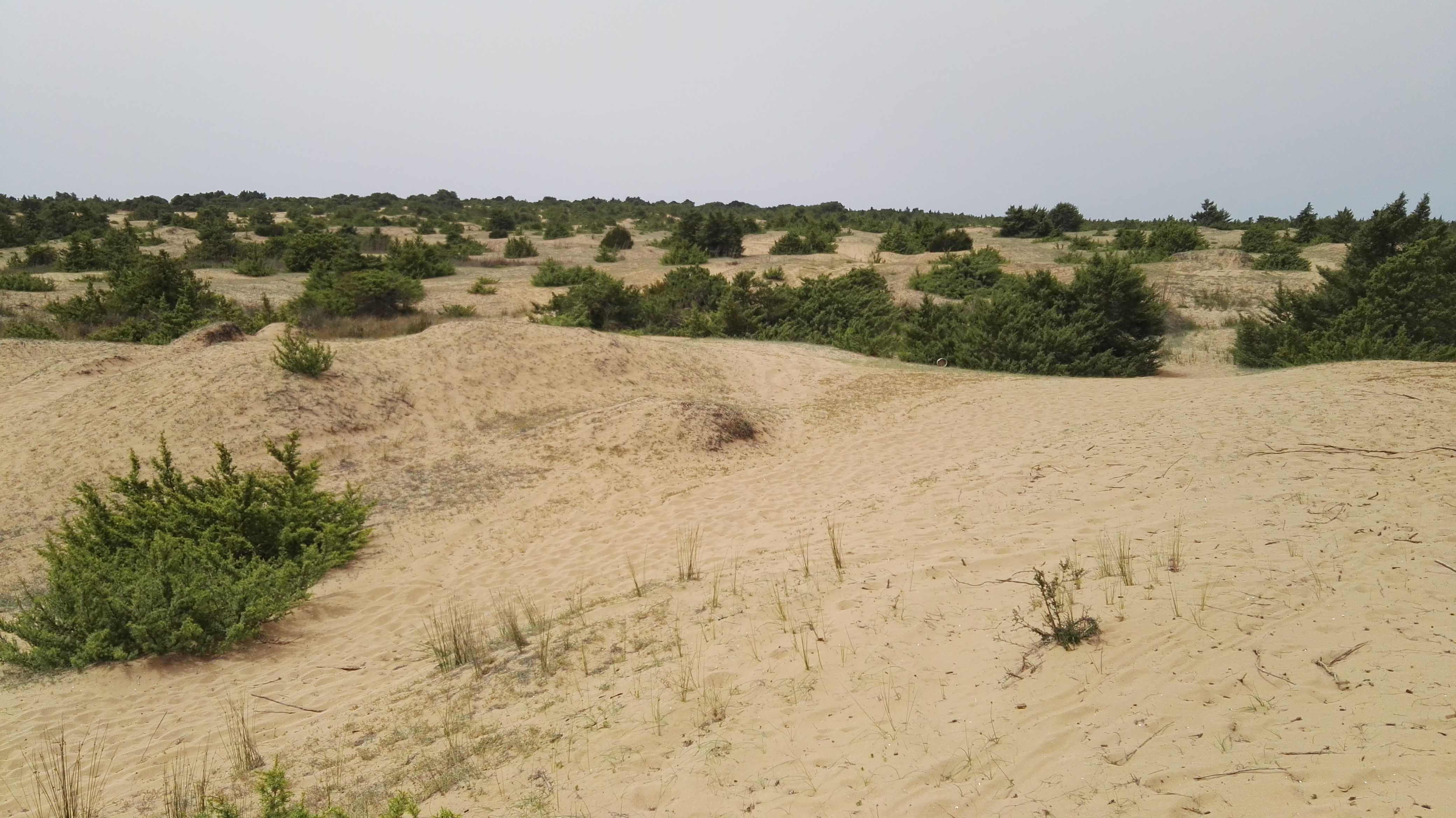 Dünen an der Lagune Korrision auf Korfu This is a photography of Natura 2000 protected area with ID GR2230002